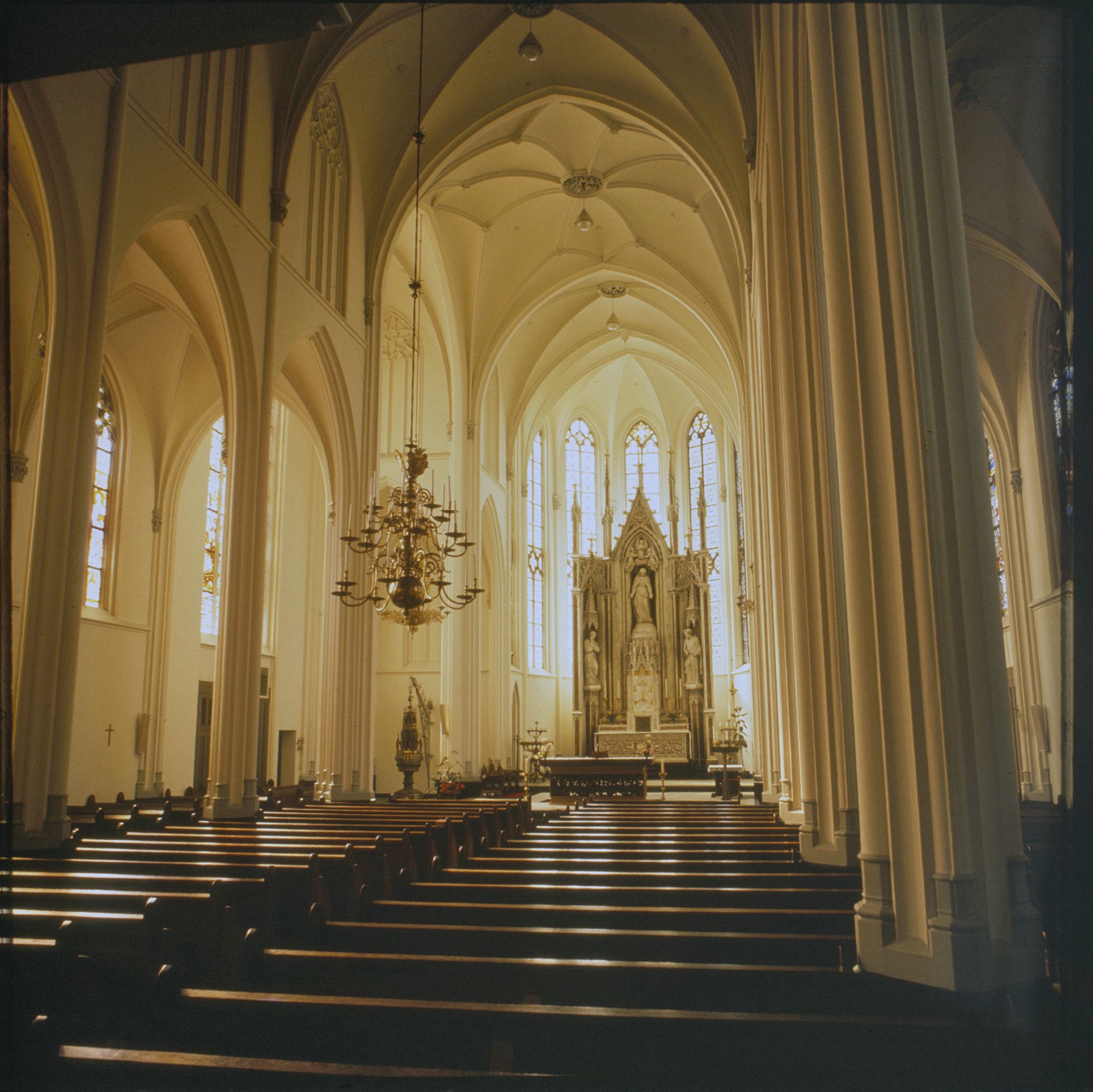 Rooms-Katholieke Kerk Onze Lieve Vrouwe Onbevlekte Ontvangenis: interieur naar het zuiden